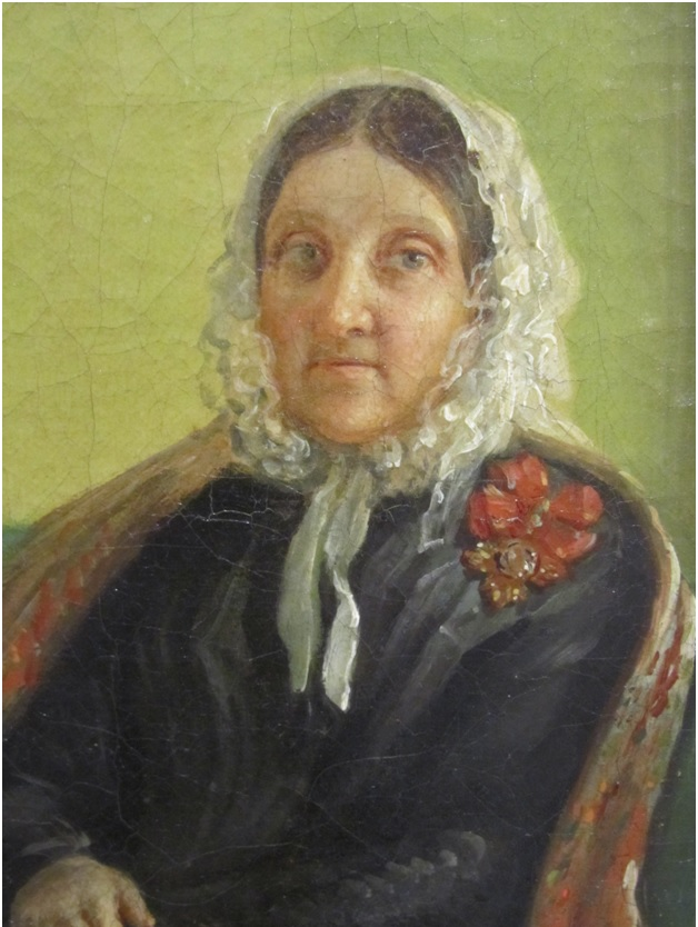 Вильгельмина Иванановна Хованская (1781—1839), жена Н. Н. Хованского (фрагмент картины "Портрет семьи Наумовых")